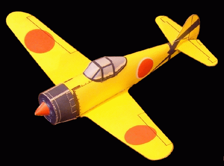 Entwurf Wallis Rigby aus den 1940er